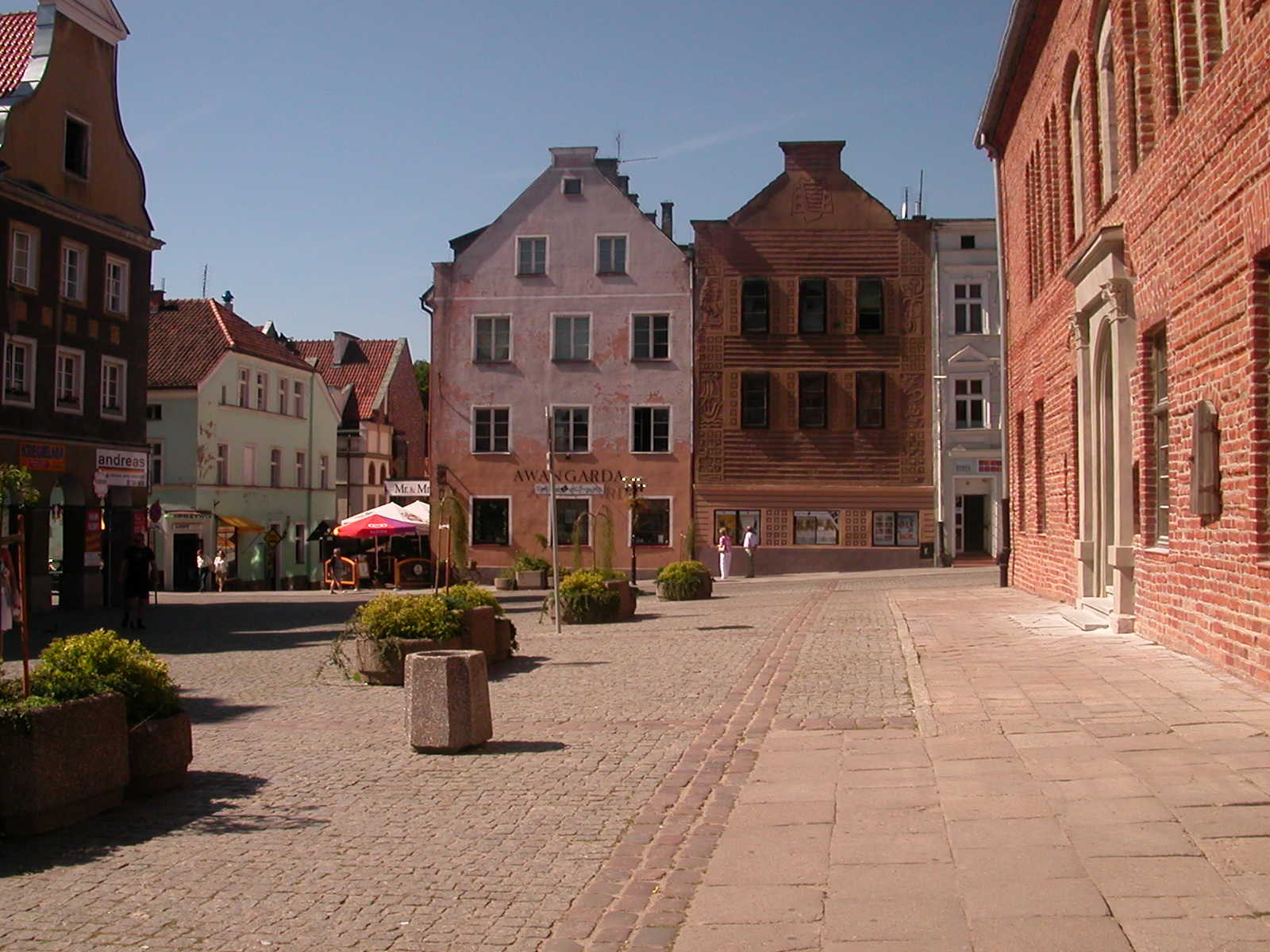 Olsztyn, ul. Stare Miasto - kamienice i fragment starego ratusza (z prawej)